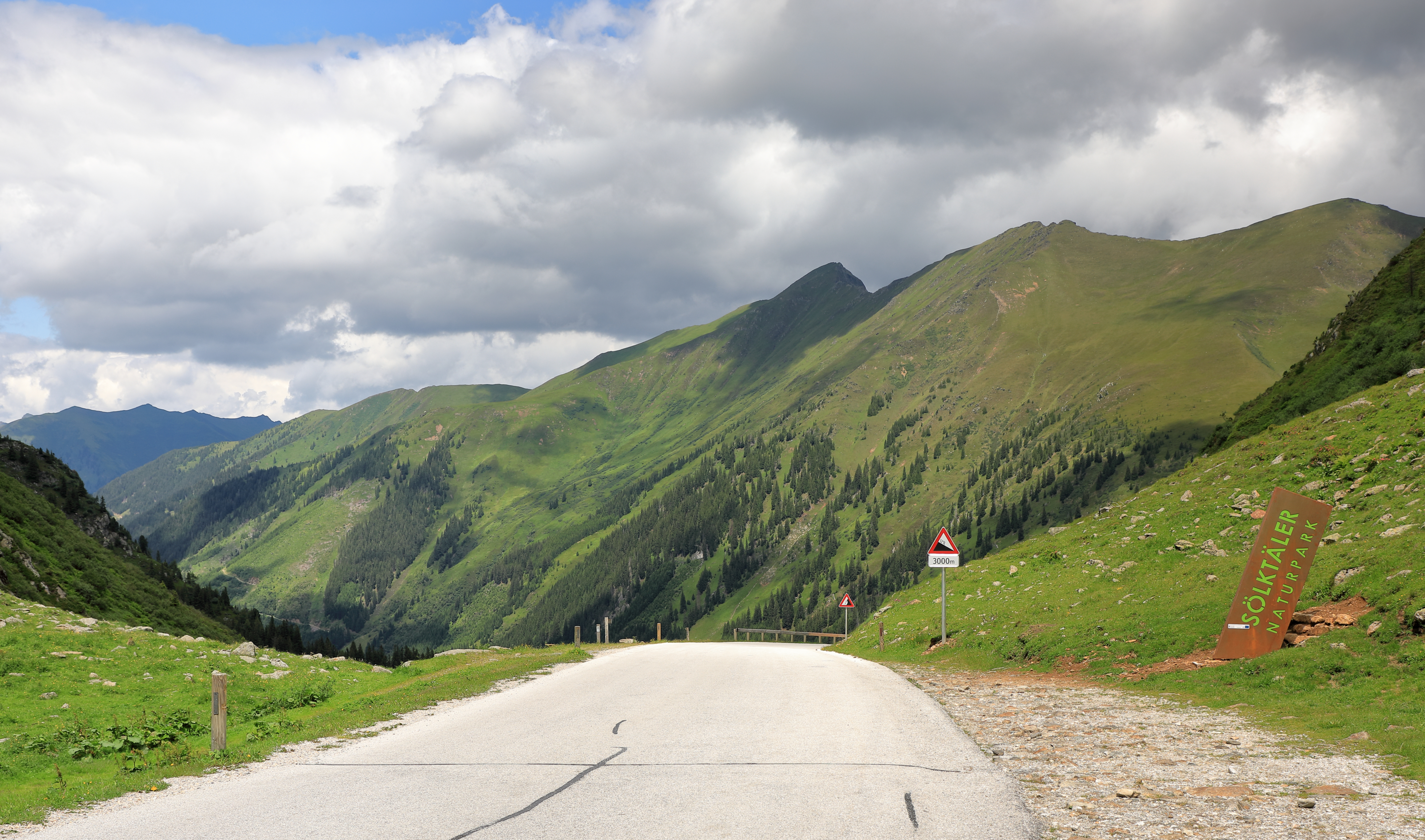 Blick vom Scheitelpunkt der Sölkpassstraße bzw. Erzherzog-Johann-Straße Richtung Norden zum Sölktal. This file shows the Nature Park with the ID 6399 in Austria.